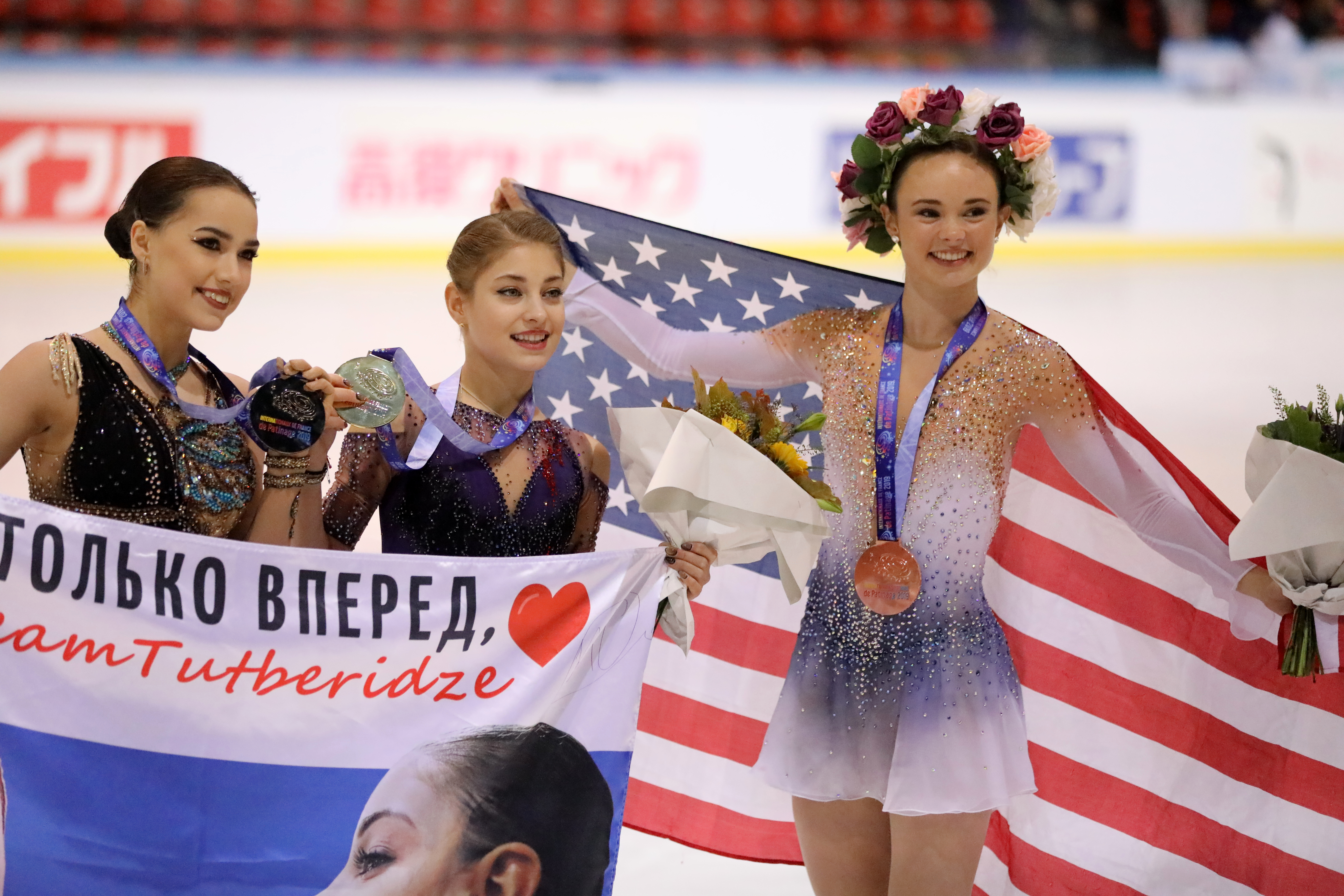 Internationaux de France 2019